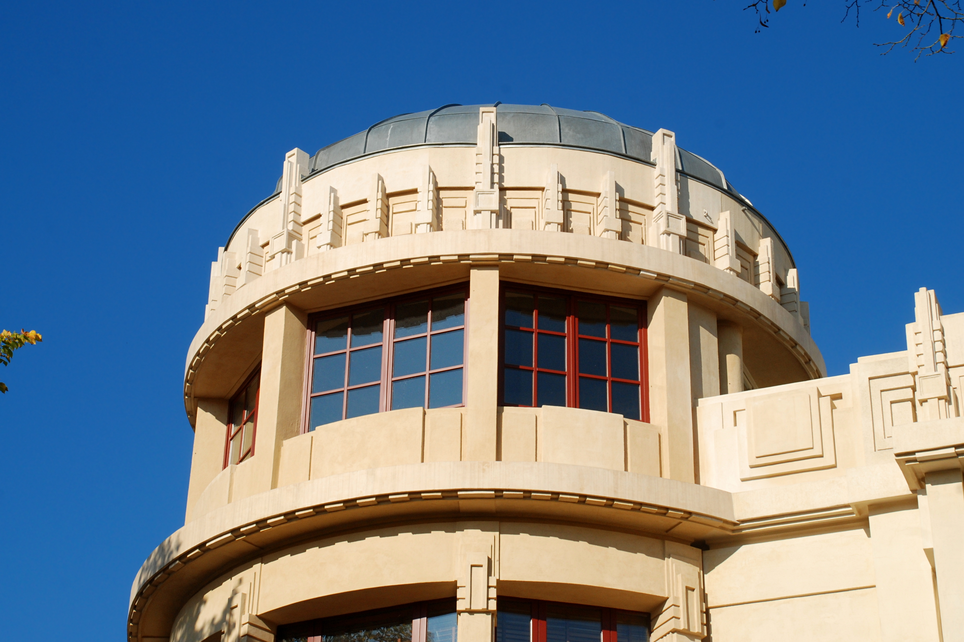 Belgique - Bruxelles - Uccle - Hôtel Haerens (Art déco - Antoine Courtens - 1928)